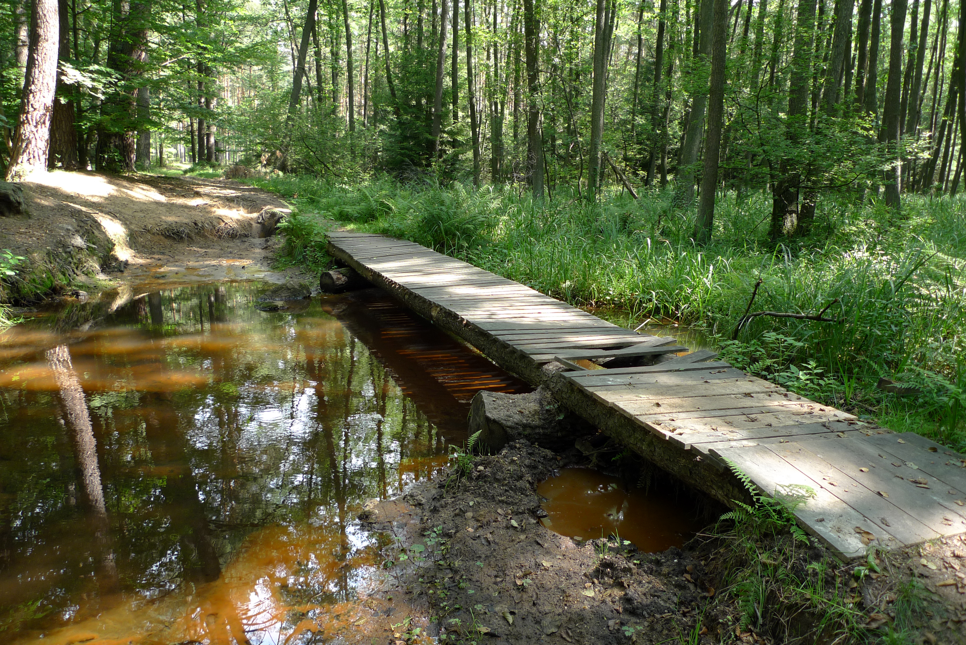 Hradčanské rybníky nedaleko Ralska v severních Čechách